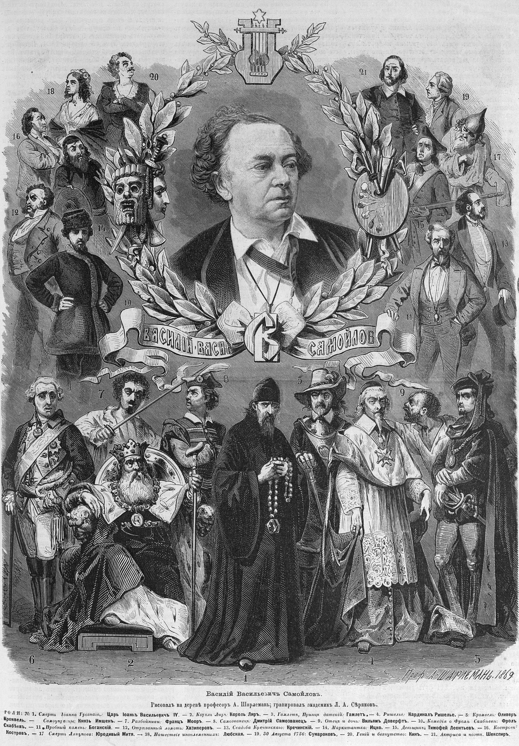 Роли актёра В. В. Самойлова